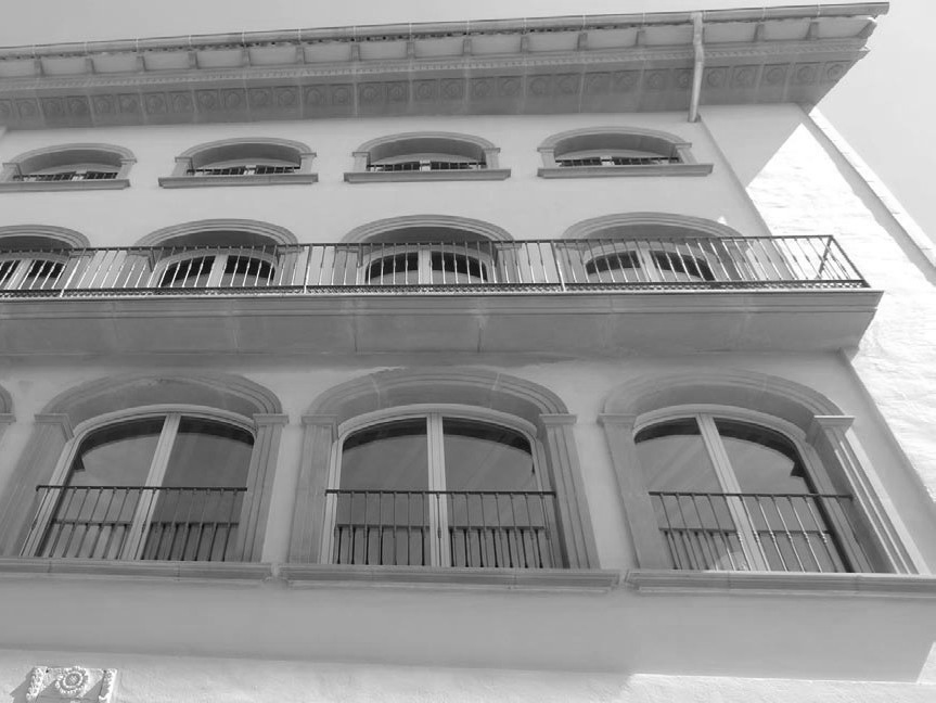 Casa de les joies situada al carrer de les joies Nº 33 al costat de l'Ajuntament.